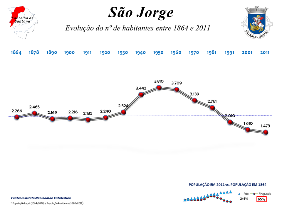 Evolução da População